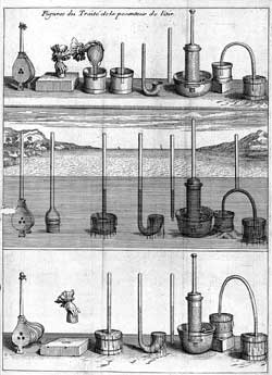 블레즈 파스칼이 에 그린 삽화.